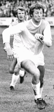 Title: FDGB-Pokal, BSG Motor Suhl - FC Karl-Marx-Stadt 1:0 Factual corrections and alternative descriptions are encouraged separately from the original description. Additionally errors can be reported at this page to inform the Bundesarchiv. Original historic description: ADN-ZB Schaar 15.10.76 Suhl: FDGB-Pokal im Fußball BSG Motor Suhl-FC Karl-Marx-Stadt 1: 0 Der Suhler Mittelstürmer Krannich (r.) ist in den Strafraum der Gastmannschaft eingedrungen. Peter Müller (FCK) versucht ihn vom Ball zu trennen. Rund 3 000 Zuschauer bejubelten den Sieg ihrer Liga-Mannschaft über den Vertreter der höchsten Spielklasse der DDR.